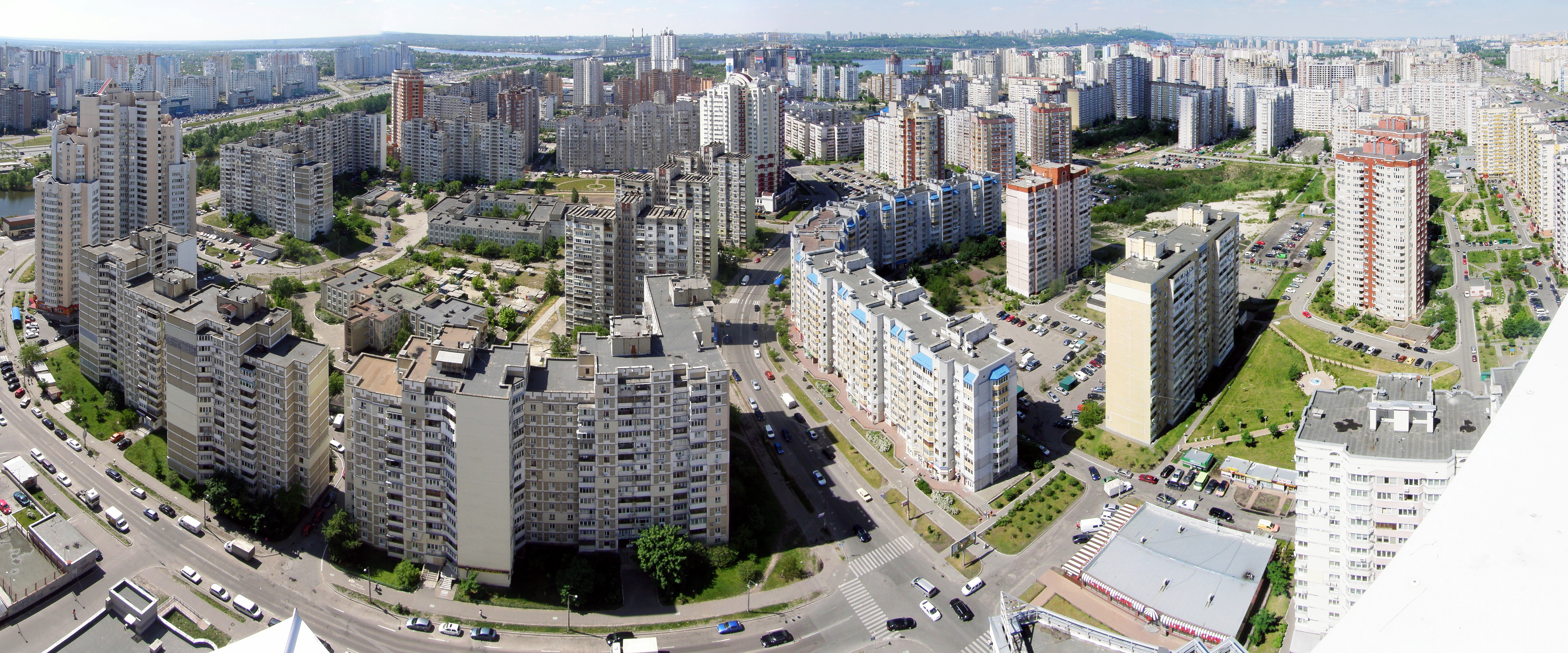 10 и 8 микрорайоны Позняков